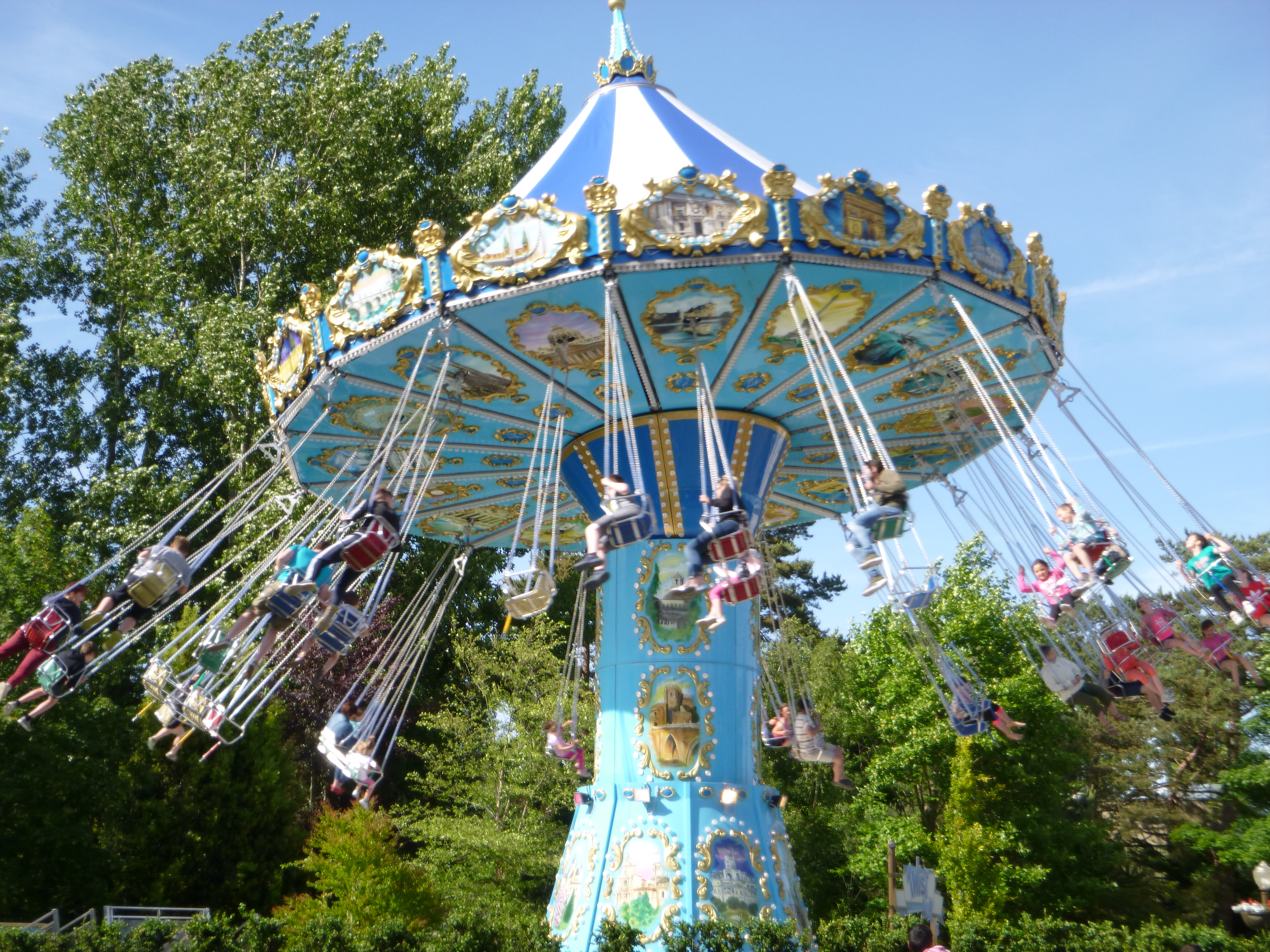 Twist'Air Bagatelle